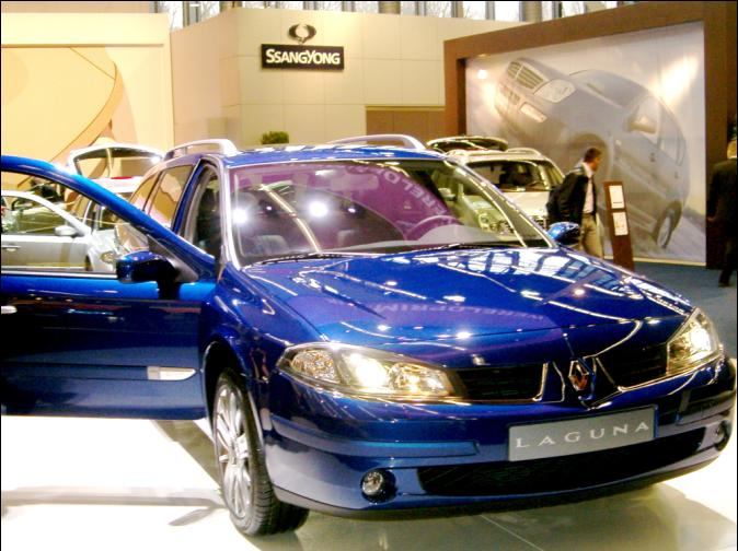 première Autorai Amsterdam.